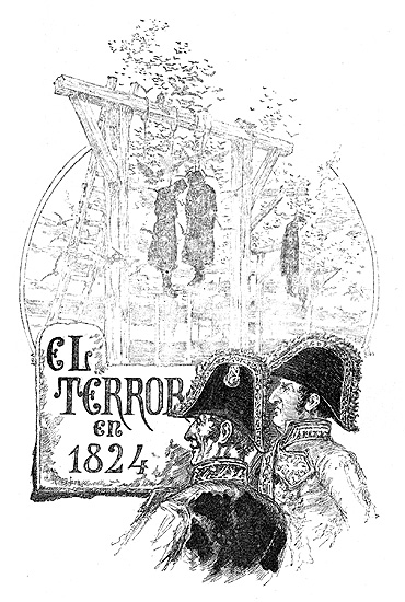 Ilustración de El terror de 1824 de Benito Pérez Galdós. Ilustradores: Gómez Soler y Pellicer. Madrid, Administración de La Guirnalda y Episodios Nacionales, 1885.